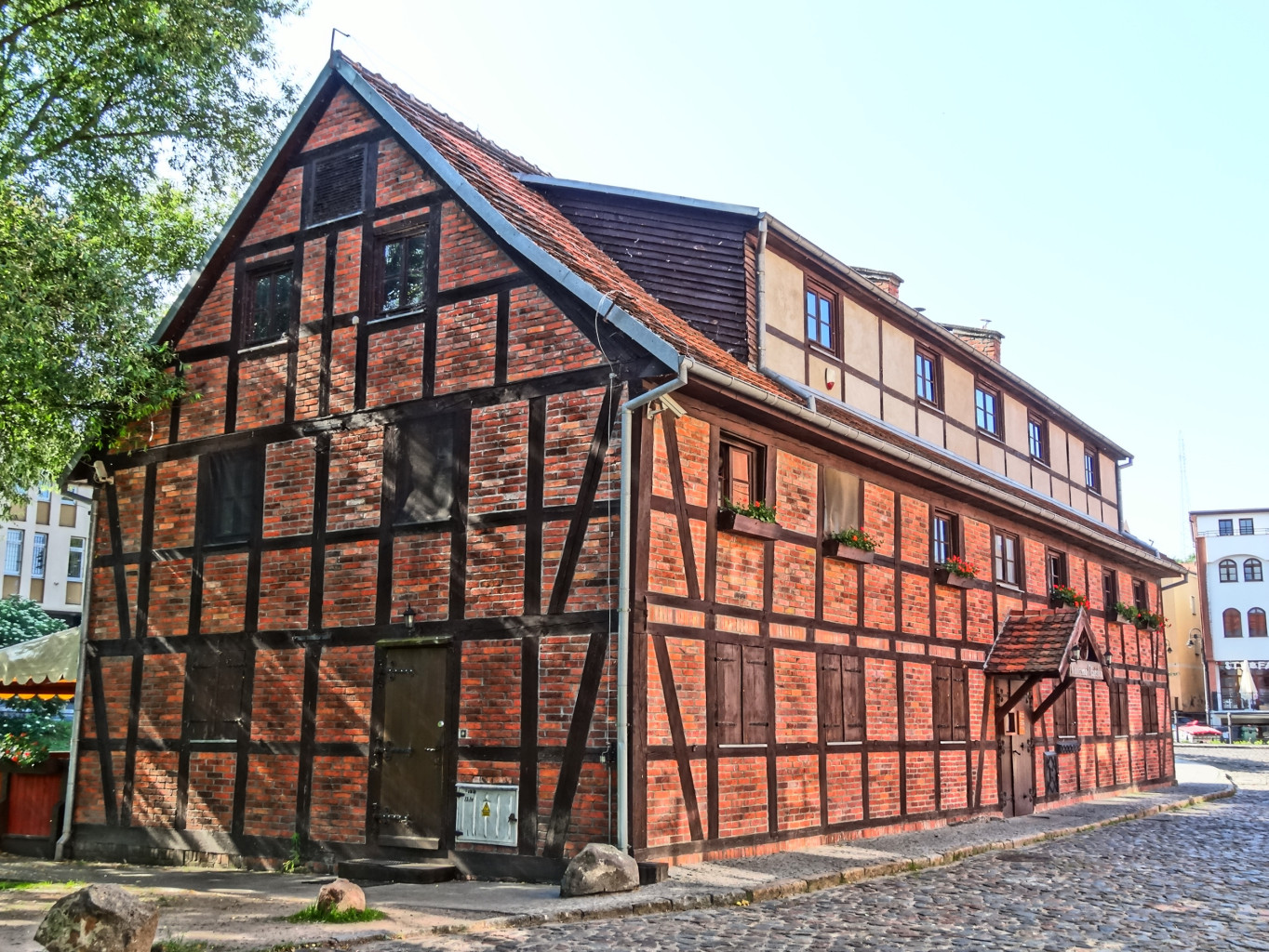 Budynek szachulcowy zwany Karczmą Młyńską zlokalizowany na Wyspie Młyńskiej w Bydgoszczy, zbud. około 1835 roku